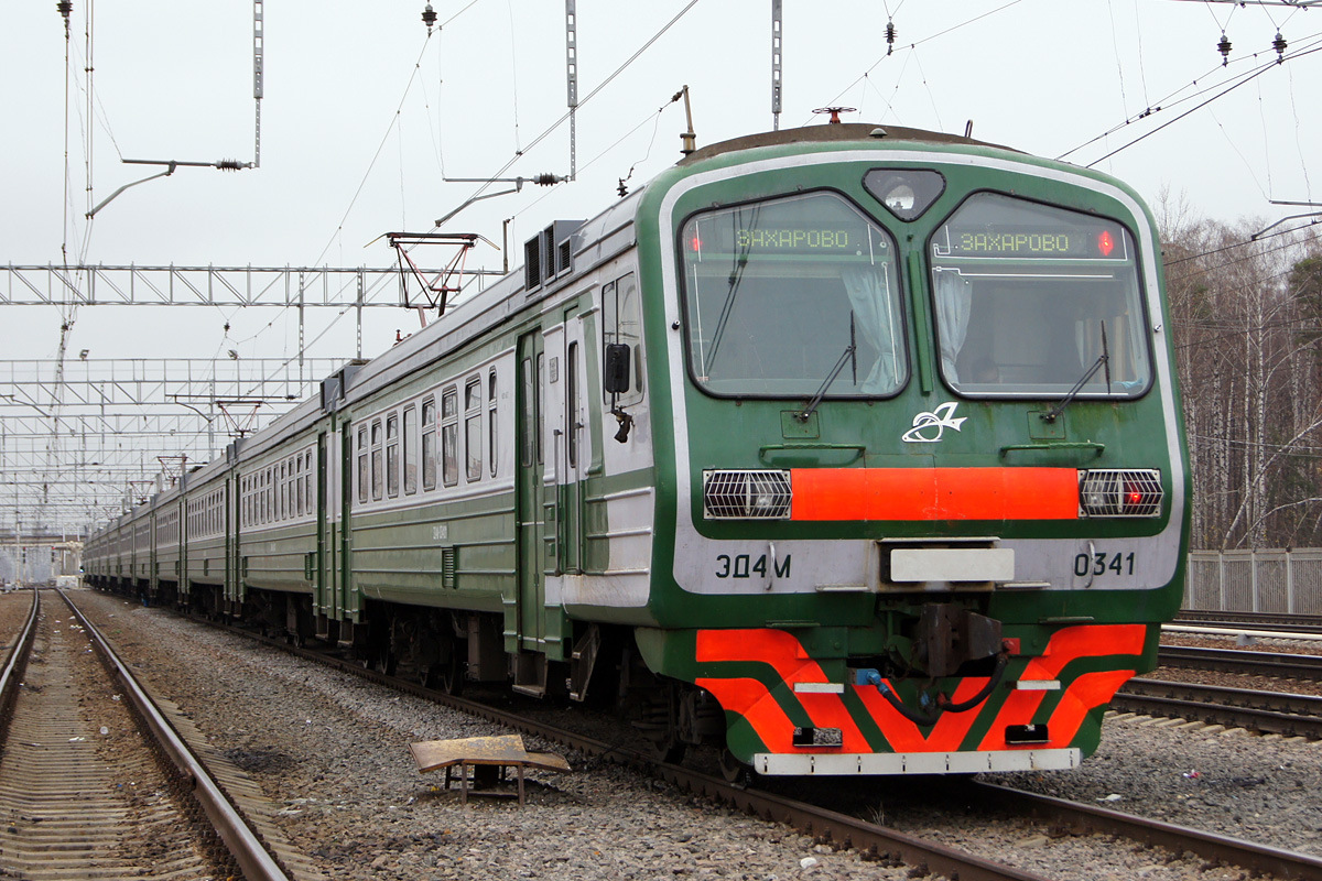 Электропоезд построен в 11-вагонной составности С завода поступил в ТЧ-4 Железнодорожная Мск 02.2013 — ТР-2 ТЧ-17 Нахабино МСК 03.2015 — в ТЧ-3 Перерва МСК перекрашен в корпоративные цвета ОАО «РЖД»